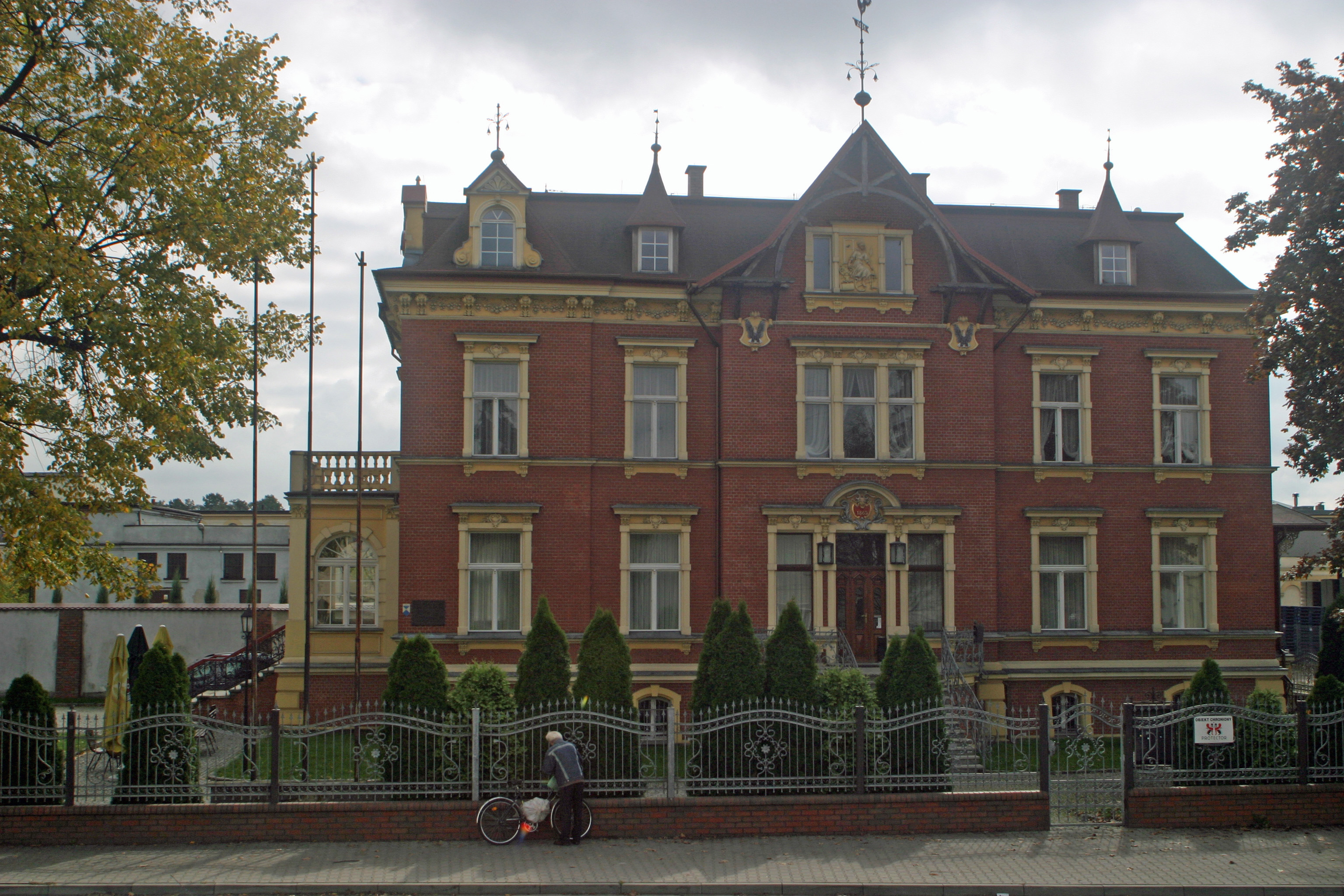 Myszków, ul. Kościuszki 8 - pałacyk fabrykanta, 1895